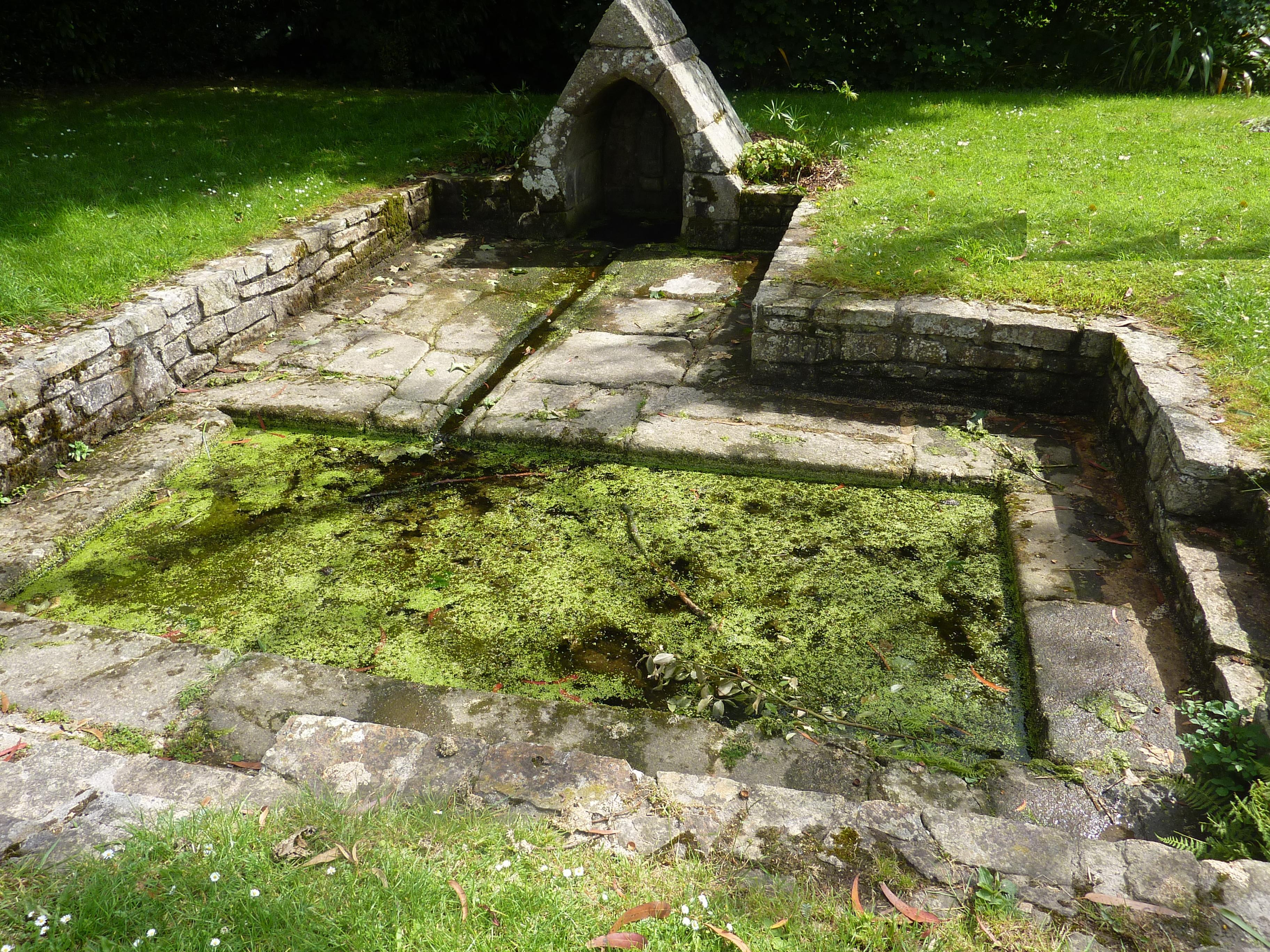 Fontaine Saint-Divy à Saint-Divy (Finistère)